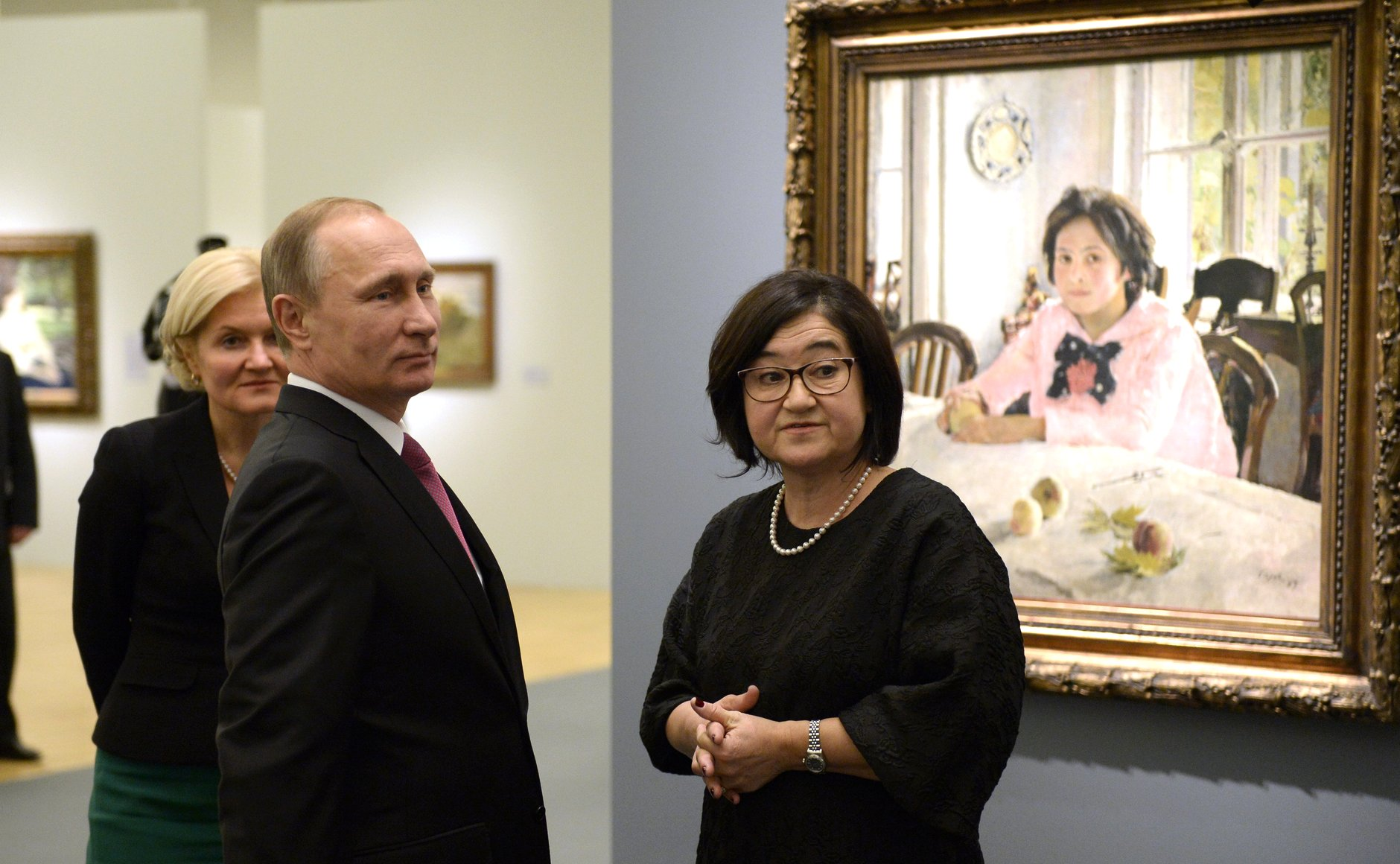 Посещение Президентом России Владимиром Путиным выставки «Валентин Серов. К 150-летию со дня рождения» в Третьяковской галерее на Крымском Валу в Москве